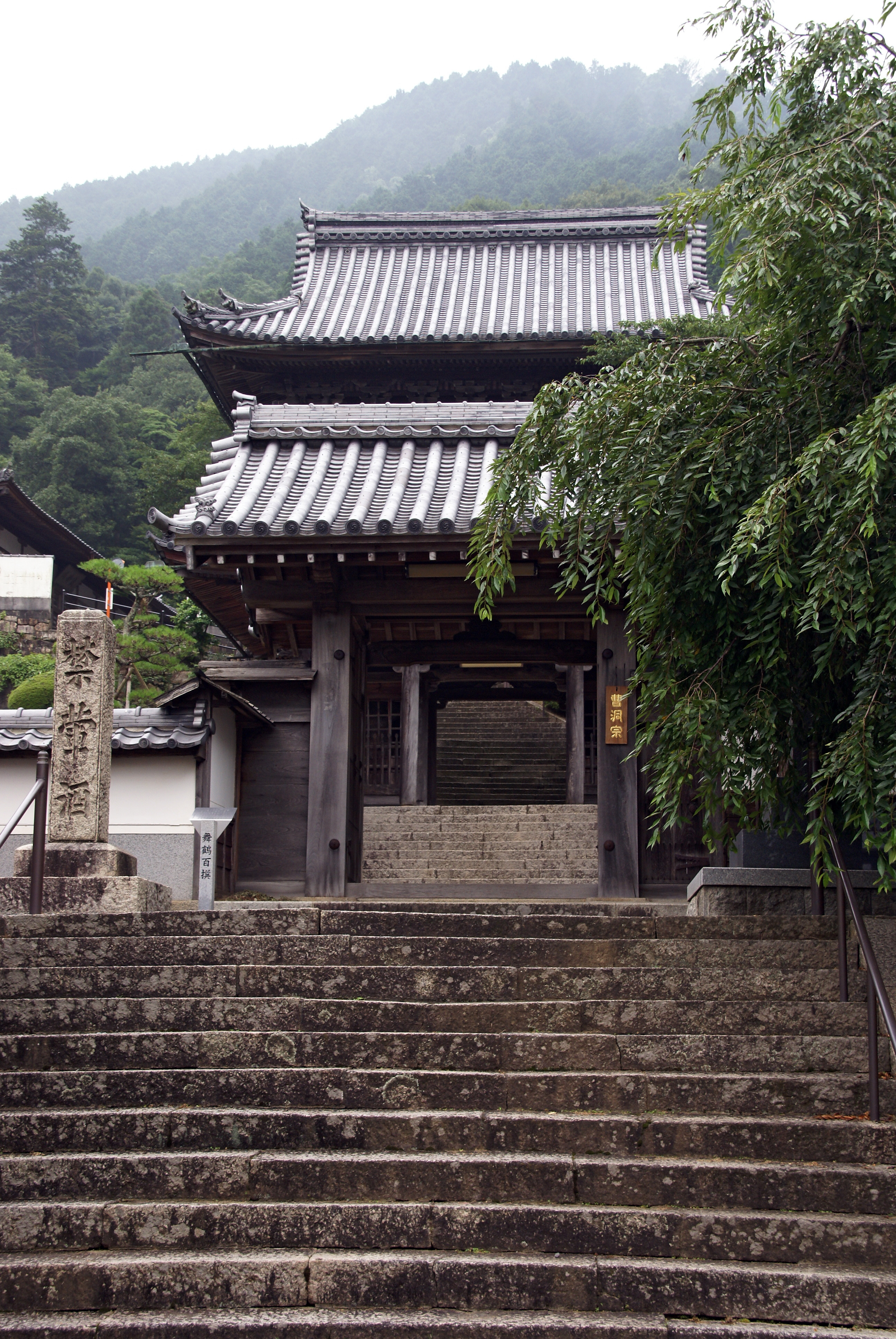 Keirinji in Maizuru, Kyoto prefecture, Japan